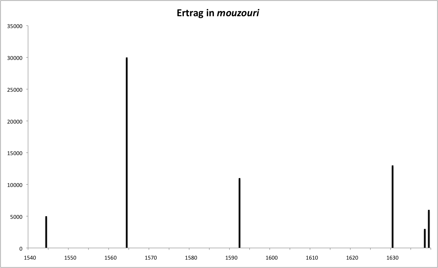 Ertraege in der Lasithi-Hochebene 14. und 15. Jh